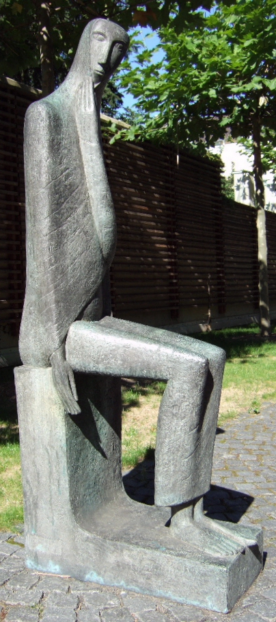 Emy Roeder: Tripoli III / Große sitzende Tripolitanerin (1963) Material: Bronze Bonn – Rheinisches Landesmuseum (Außenbereich)